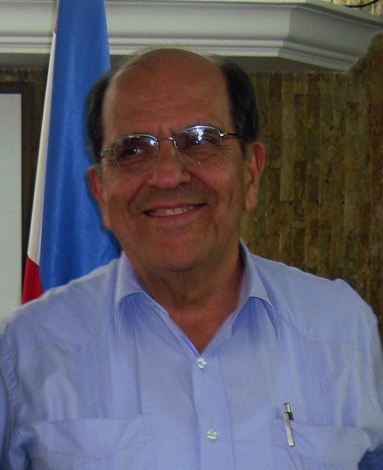 Alcalde de Cali.